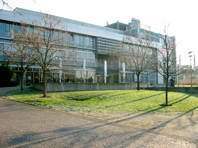 Fraunhofer-Institut für Graphische Datenverarbeitung in Darmstadt